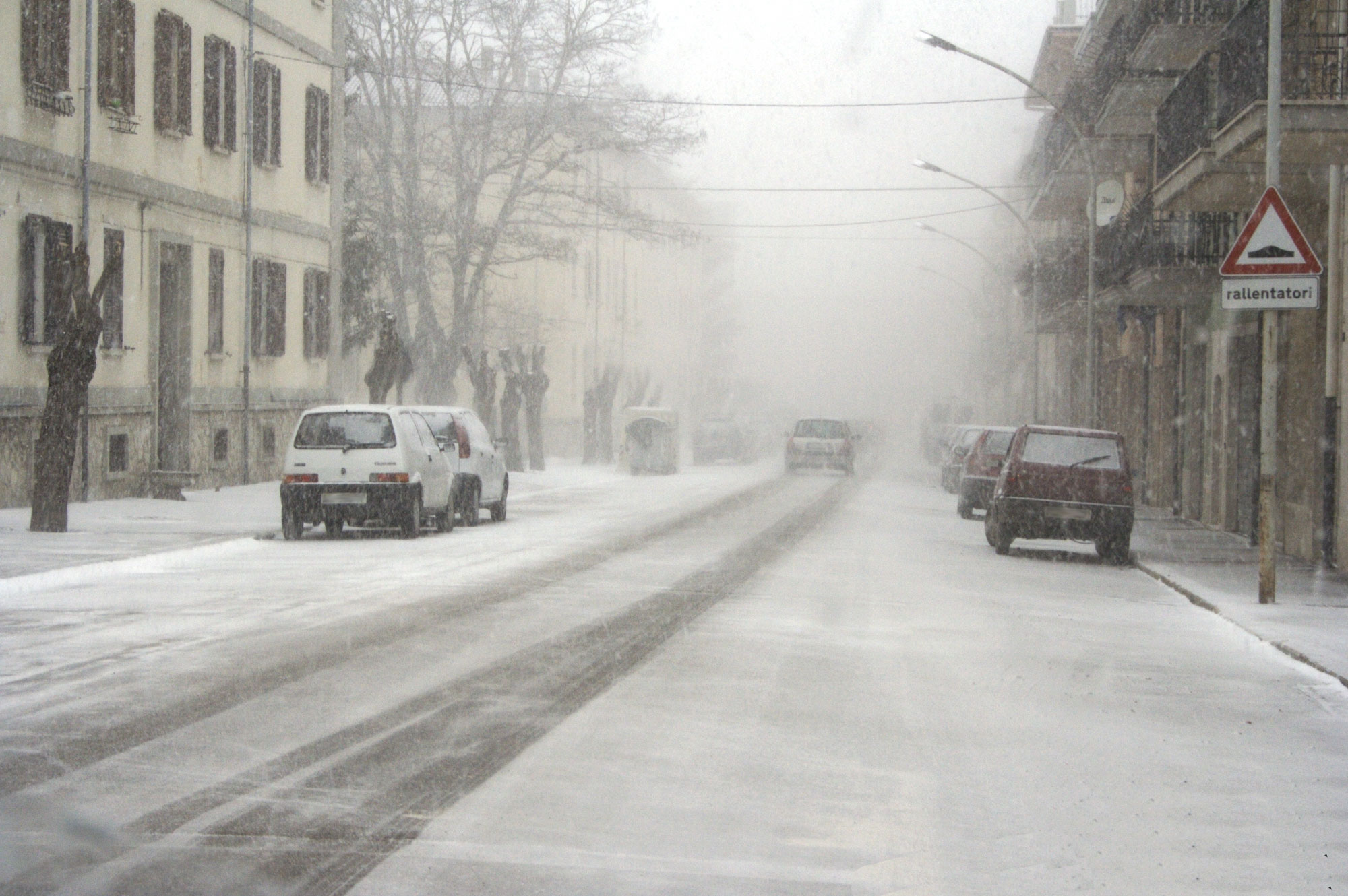 Via XX Settembre a Castel di Sangro sotto la neve